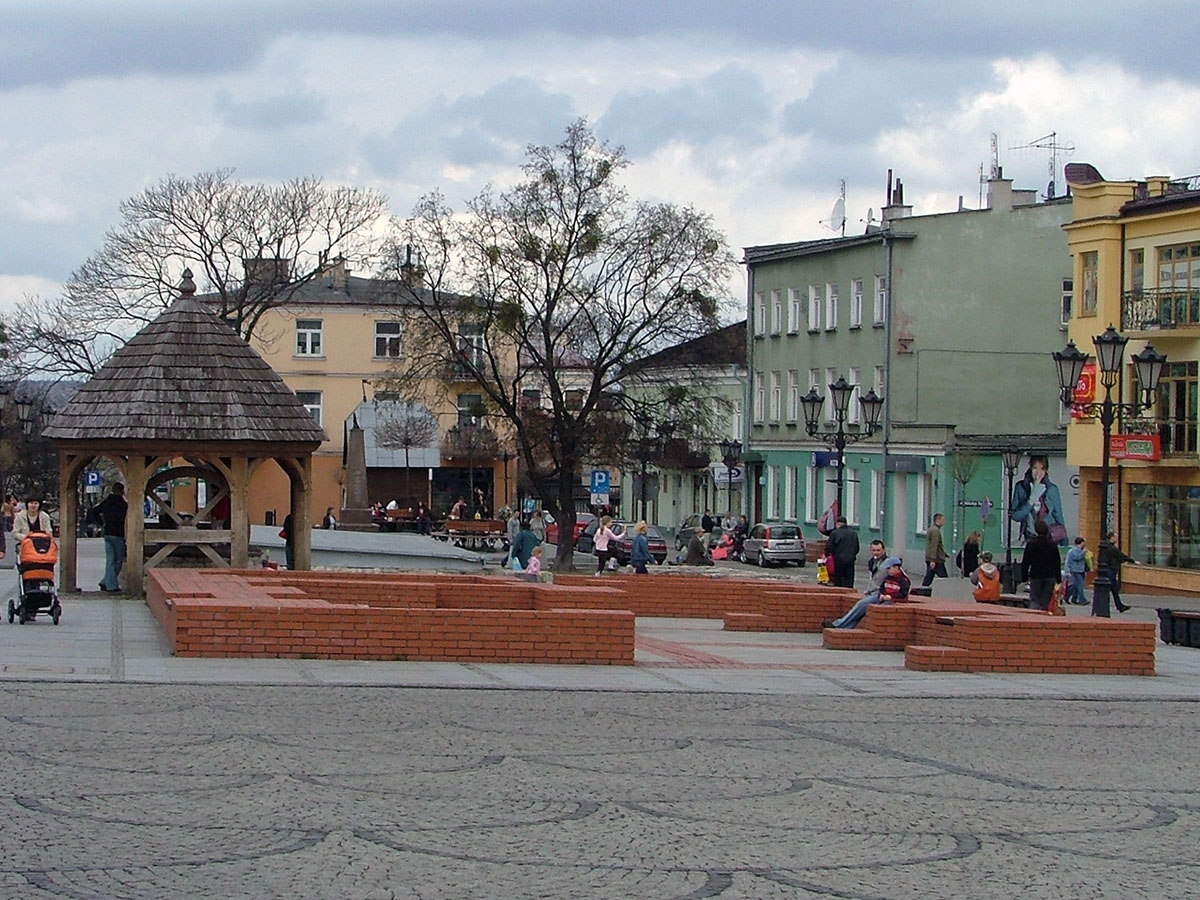 Chełm, Plac Łuczkowskiego, Starówka